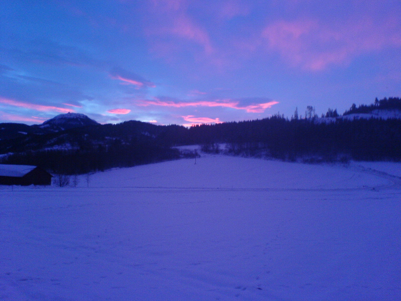 Bildet er tatt i februar i 7-tiden på morgenen, og man kan se landemerket Forbordsfjellet til venstre på bildet. En ekte vintermorgen i Trøndelag!